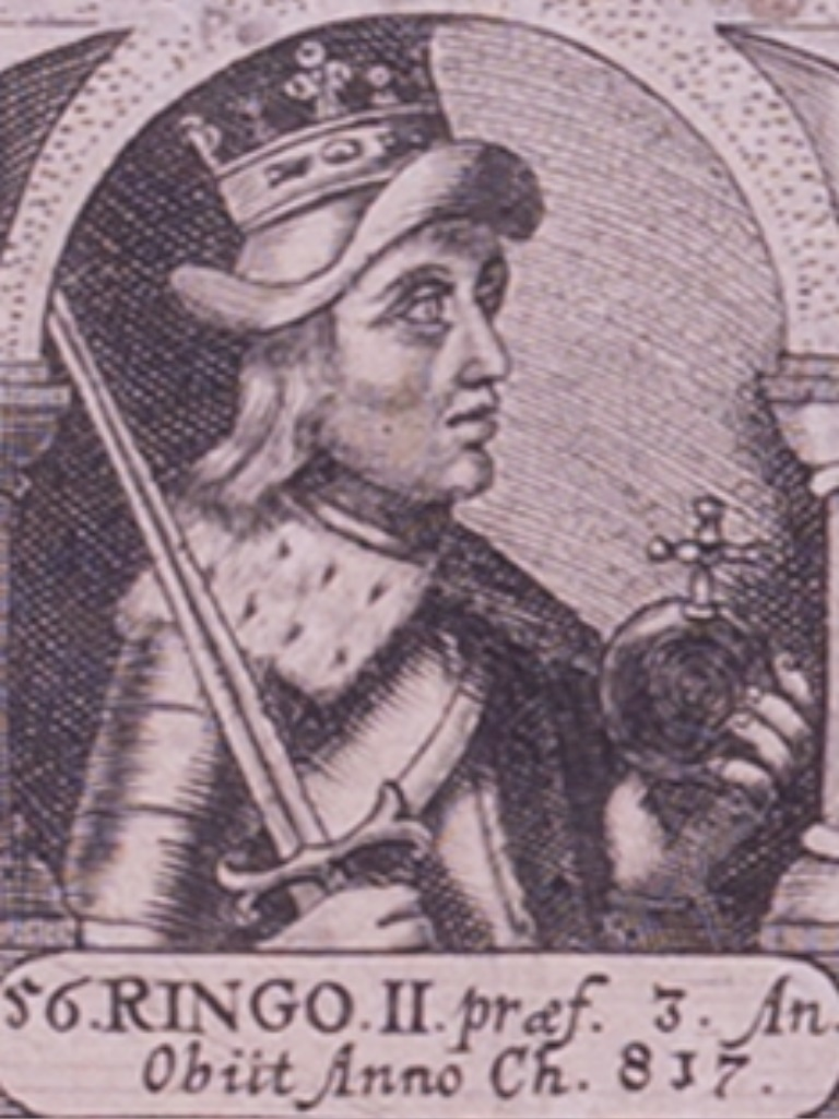 Mindre udsnit forestillende den danske konge Ring/Anulo fra "Veræ effigies regum omnium qvi a primo Dan usqe Christianum IV modo regnantem imperii Danici gloria eminuerunt" udgivet i 1670 af Erico Olai Tormio. Anulo var kortvarigt i 812 et af to kongsemner, der kæmpede om magten i Danmark. Han faldt i et stort slag, men hans brødre udnævntes efterfølgende til konger.